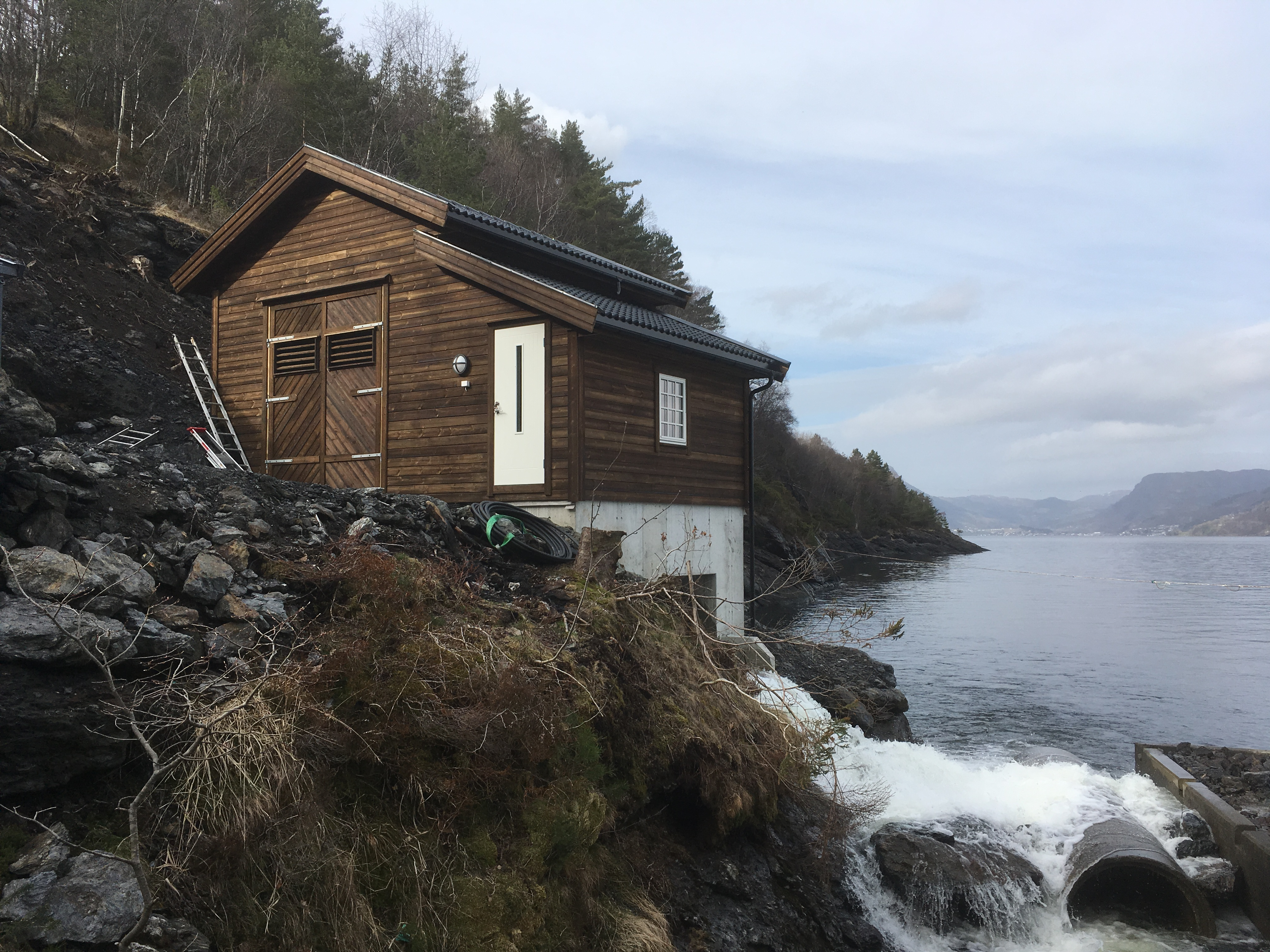 Sandvik kraftverk (Egil Kambo)